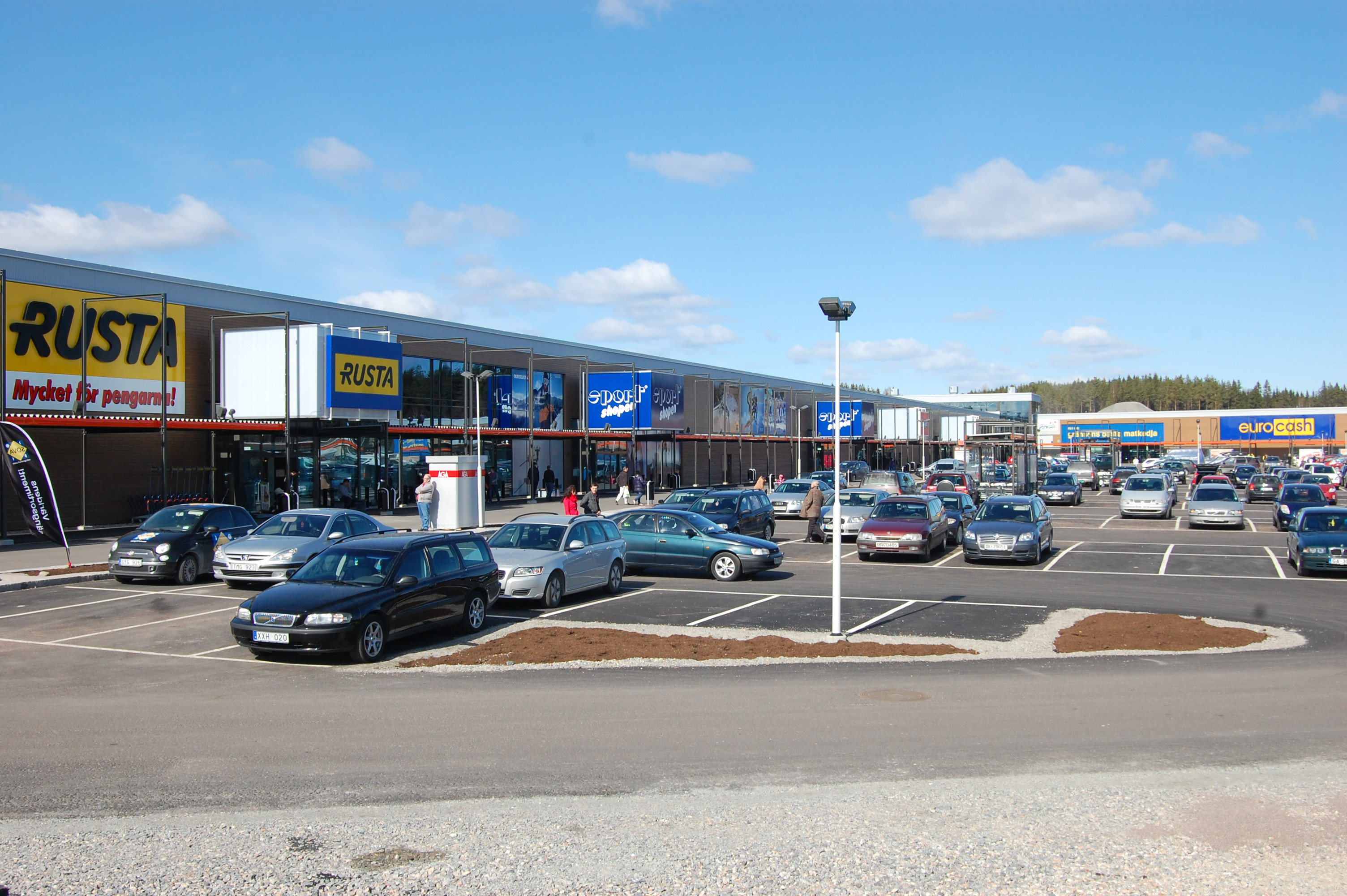 Töcksfors handelspark i västra Värmland invigdes den 29 mars 2012 och består av totalt 17 butiker.